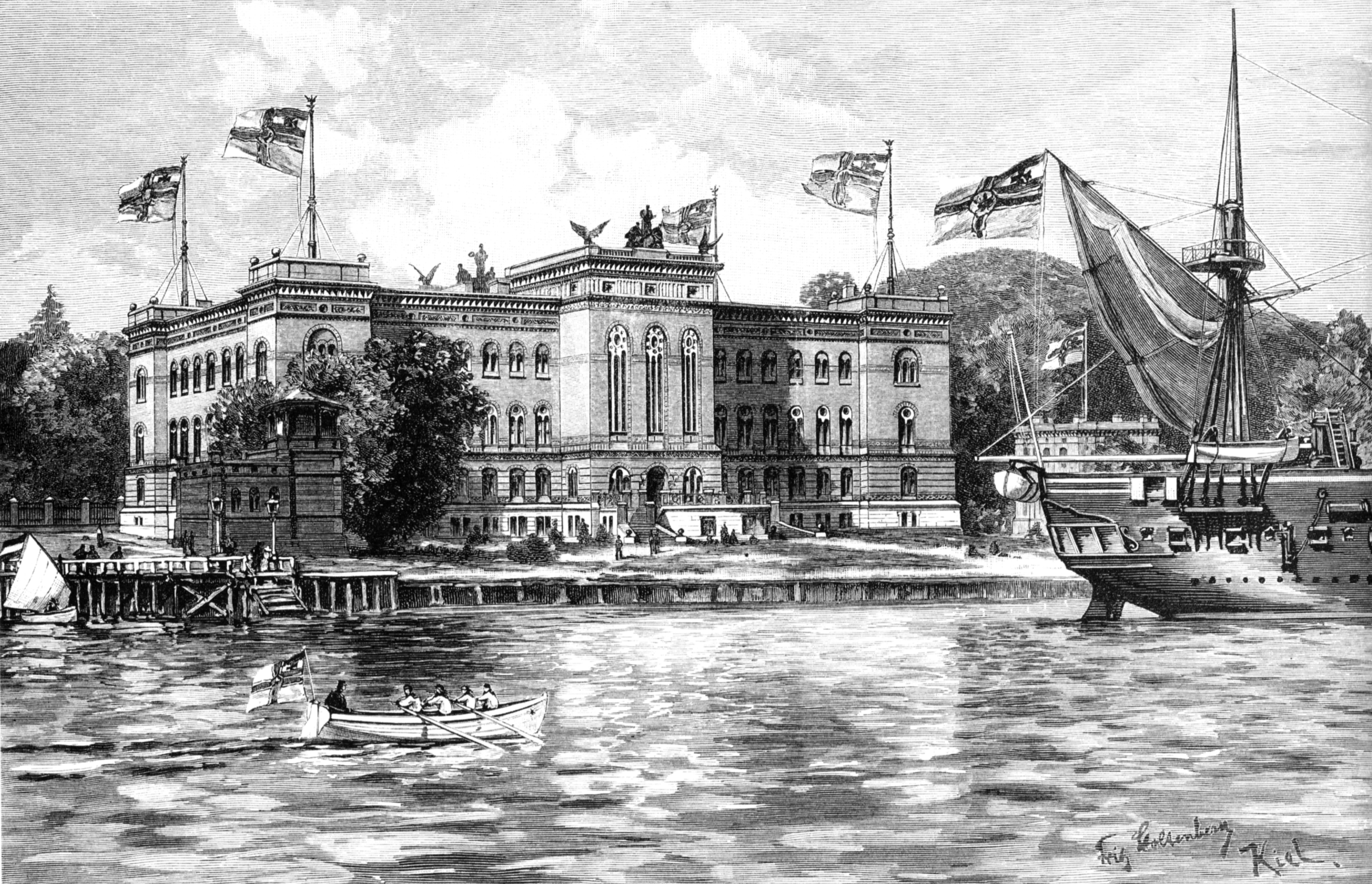 Die Marine-Akademie in Kiel, Zeichnung von Fritz Stoltenberg